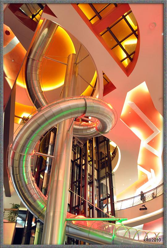 fX Lifestyle X’nter Urbanite Utopia Jl. Jenderal Sudirman Pintu Satu Senayan Jakarta 10270